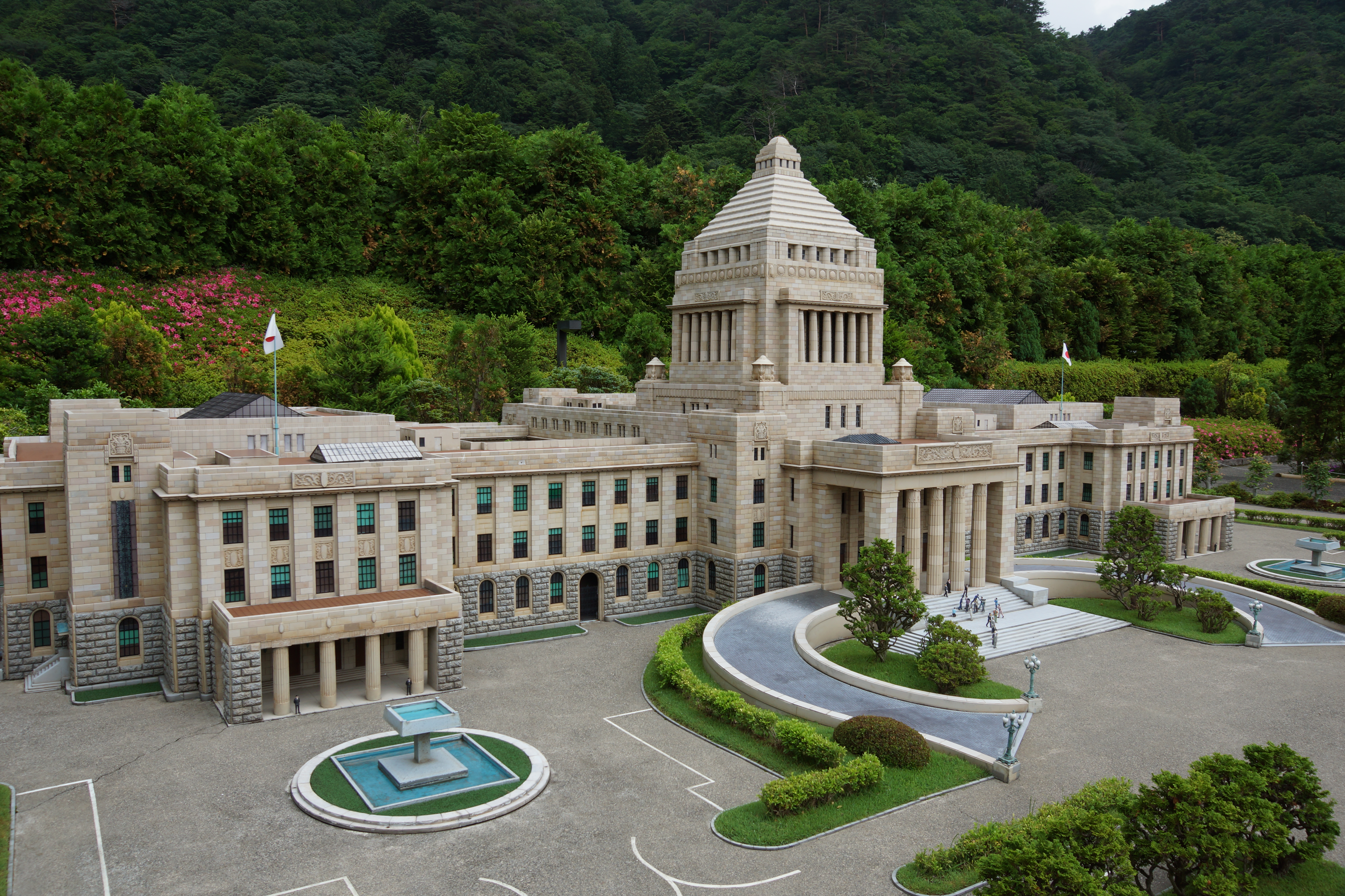 東武ワールドスクエアに展示されている国会議事堂のミニチュア。